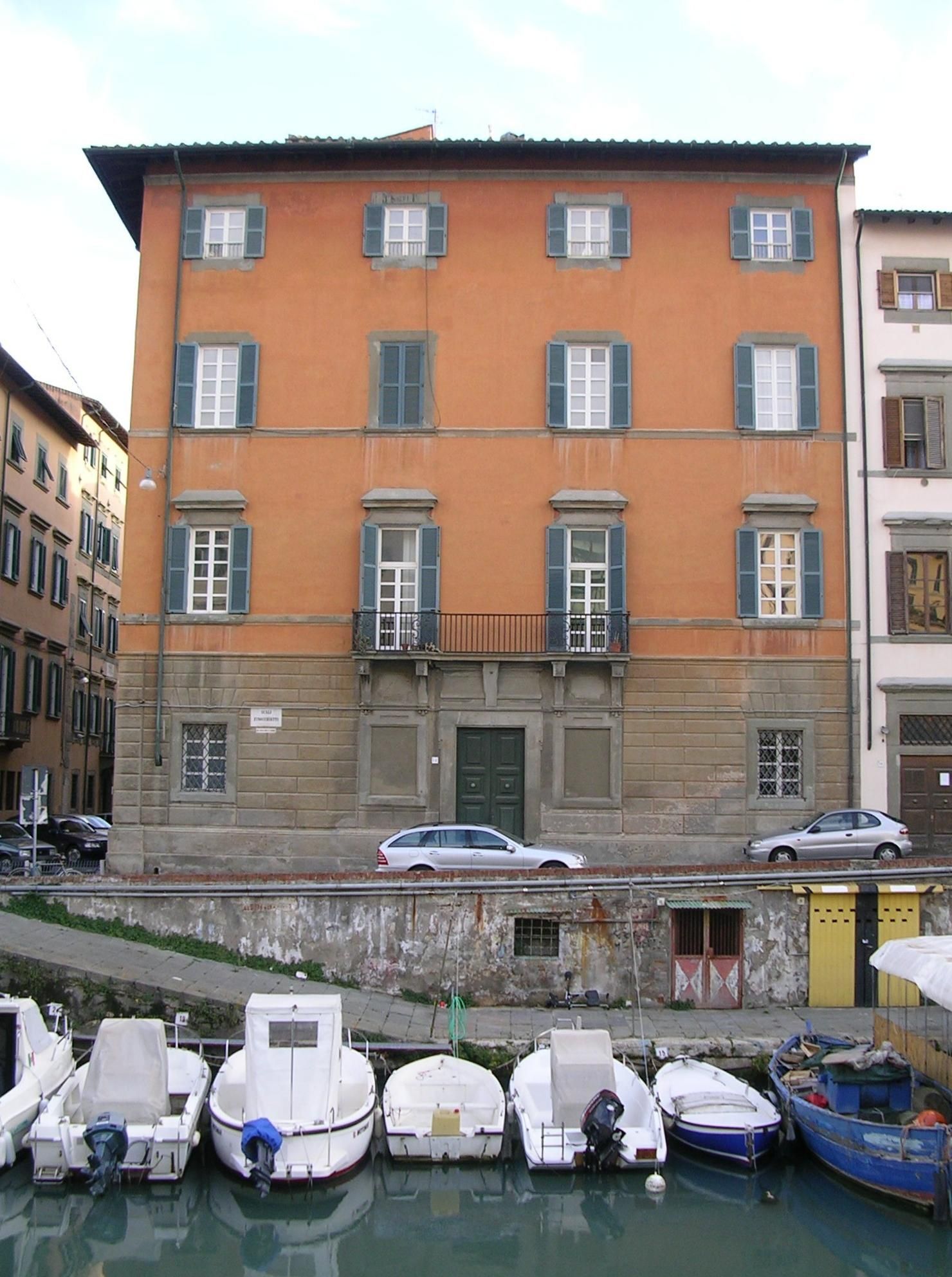 Livorno: il Palazzo sugli Scali Finocchietti, nel quartiere della Venezia Nuova.